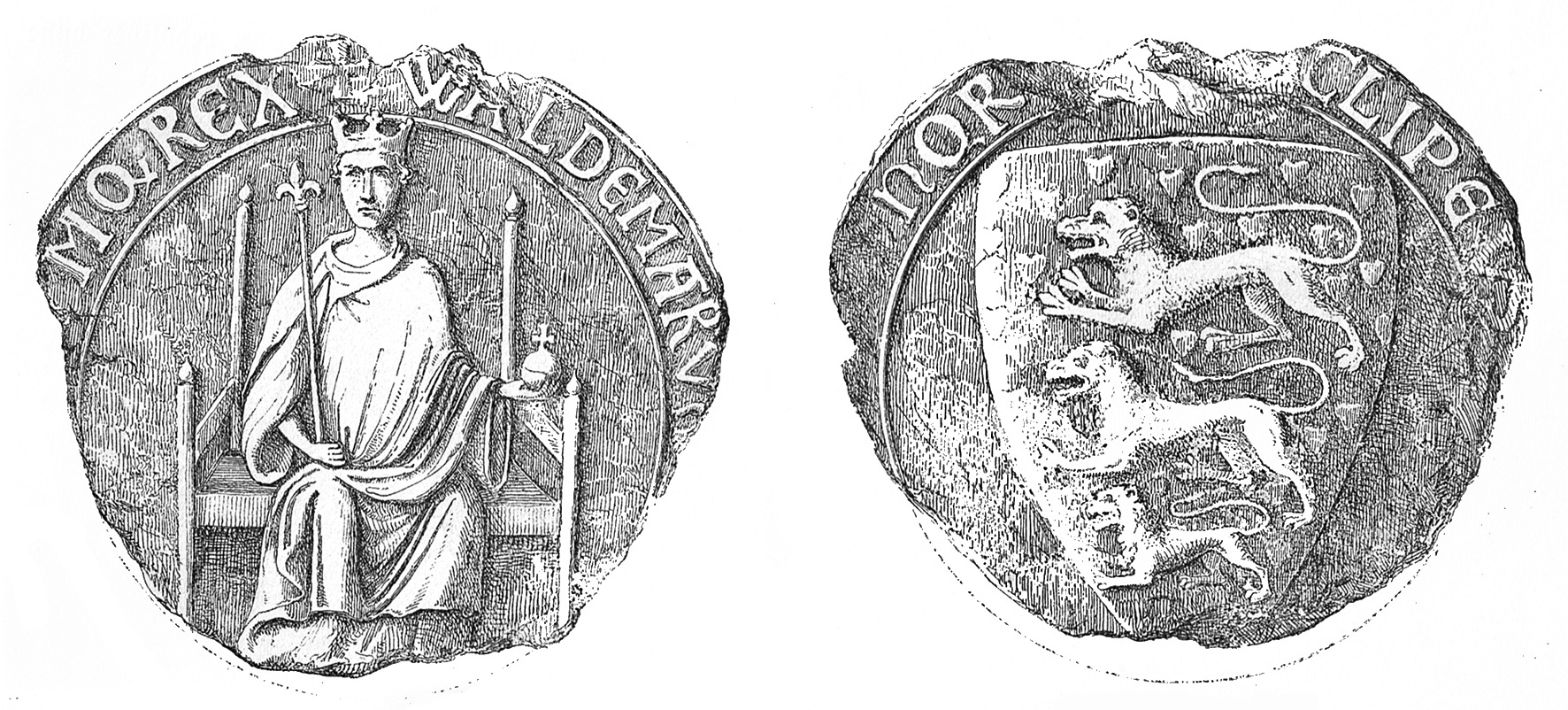 Valdemar Sejr's Segl